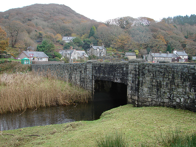 A496 road bridge at Glan-y-wern